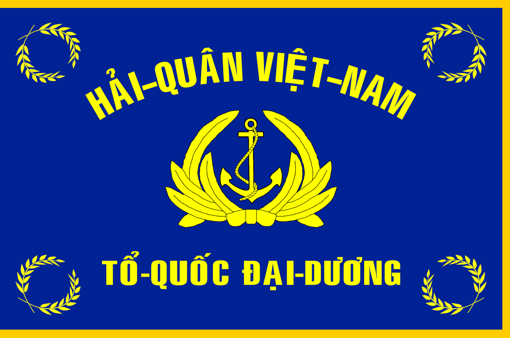 The flag of South Vietnam Navy (Hải lực Việt Nam Cộng hòa), used since 1955 to 1975.